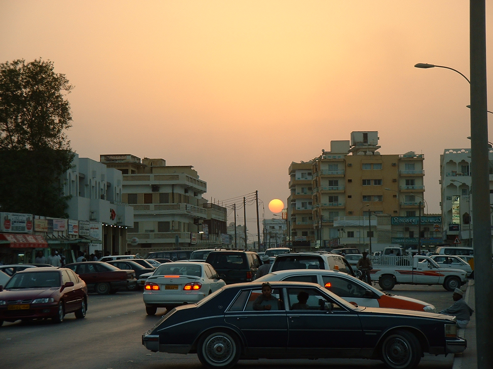 Salalah, Oman